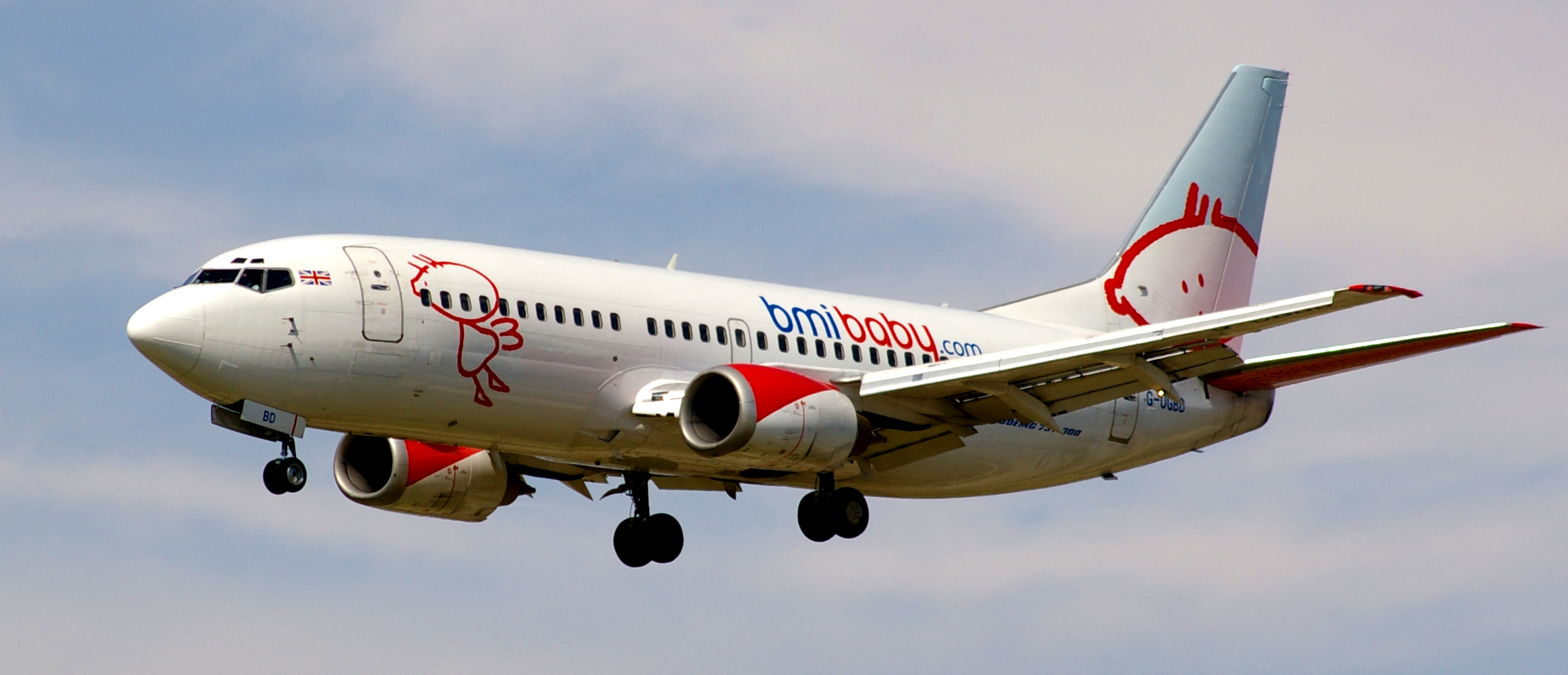 a l'Aeroport de Barcelona (Catalunya, Espanya)